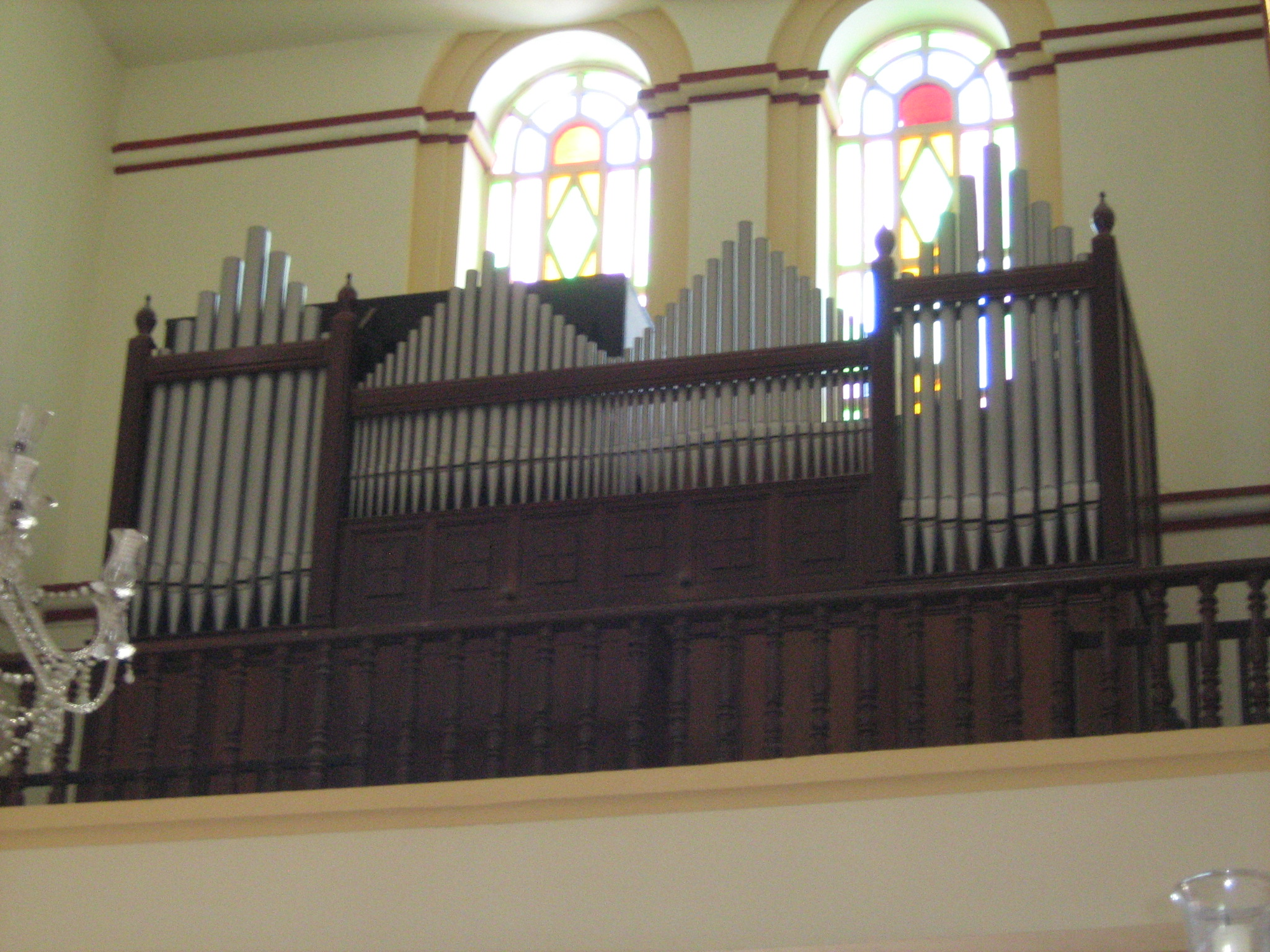 Órgano E.F. Walcker de la Basílica de Yarumal, Antioquia, Colombia.